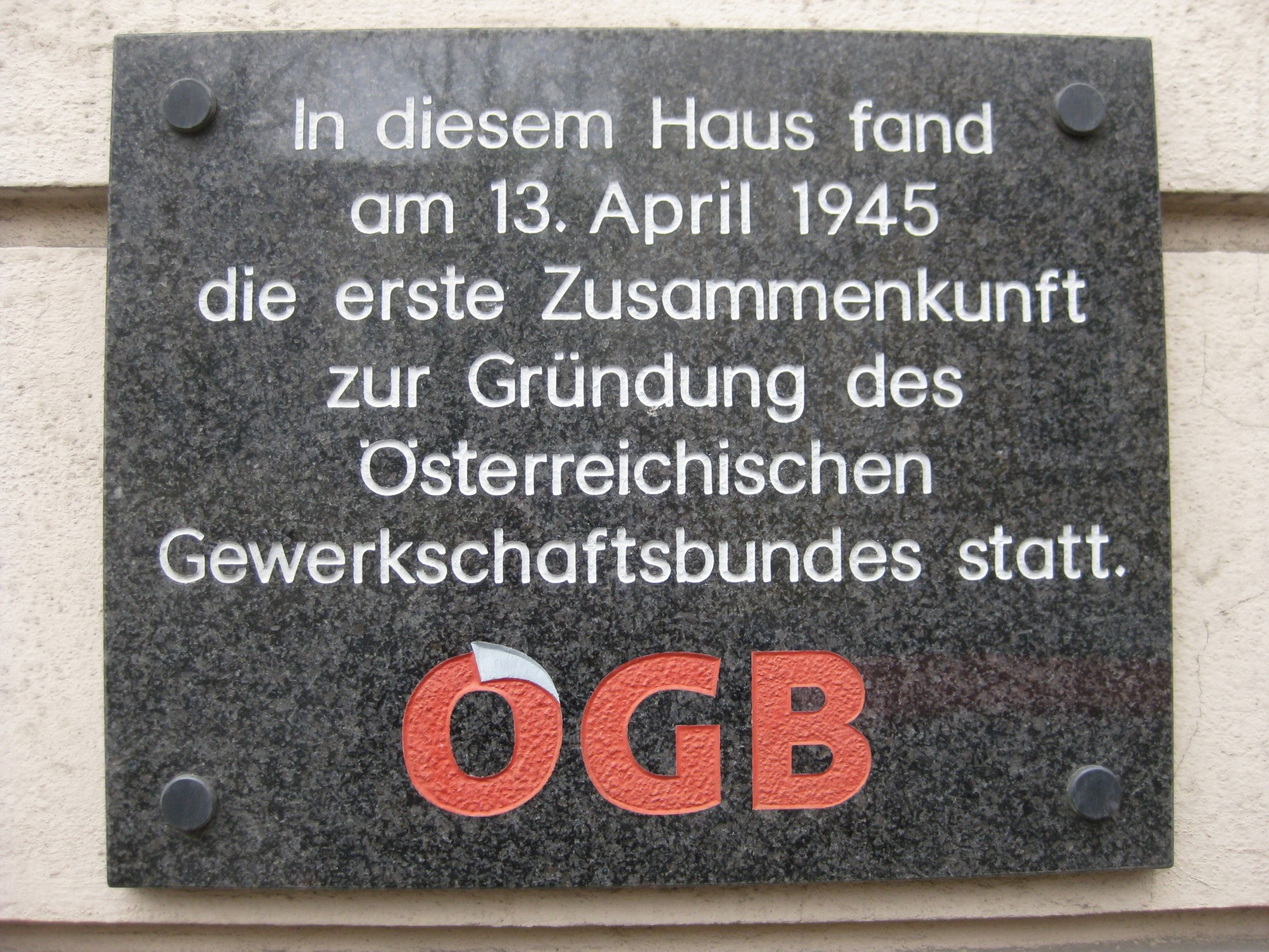 Erinnerungstafel an die Gründung des ÖGB am Haus Kenyongasse 3 in Wien-Neubau.